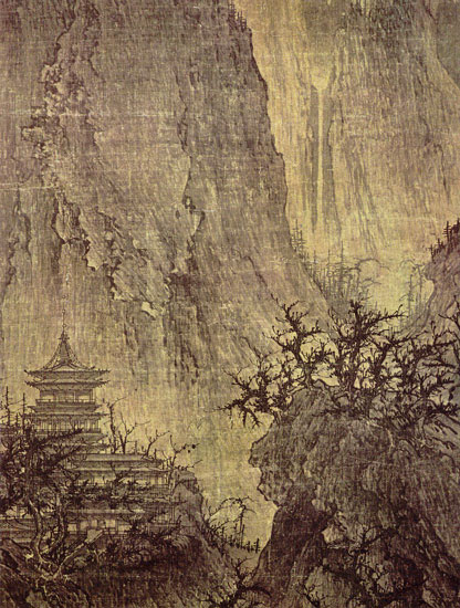 [宋] 李成 晴峦萧寺图（局部） 立轴绢本浅设色 纵110.5厘米 横55.7厘米 美国纳尔逊艺术博物馆藏 来自